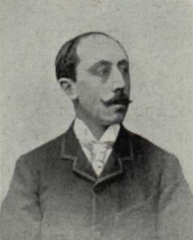 Marqués de la Mina